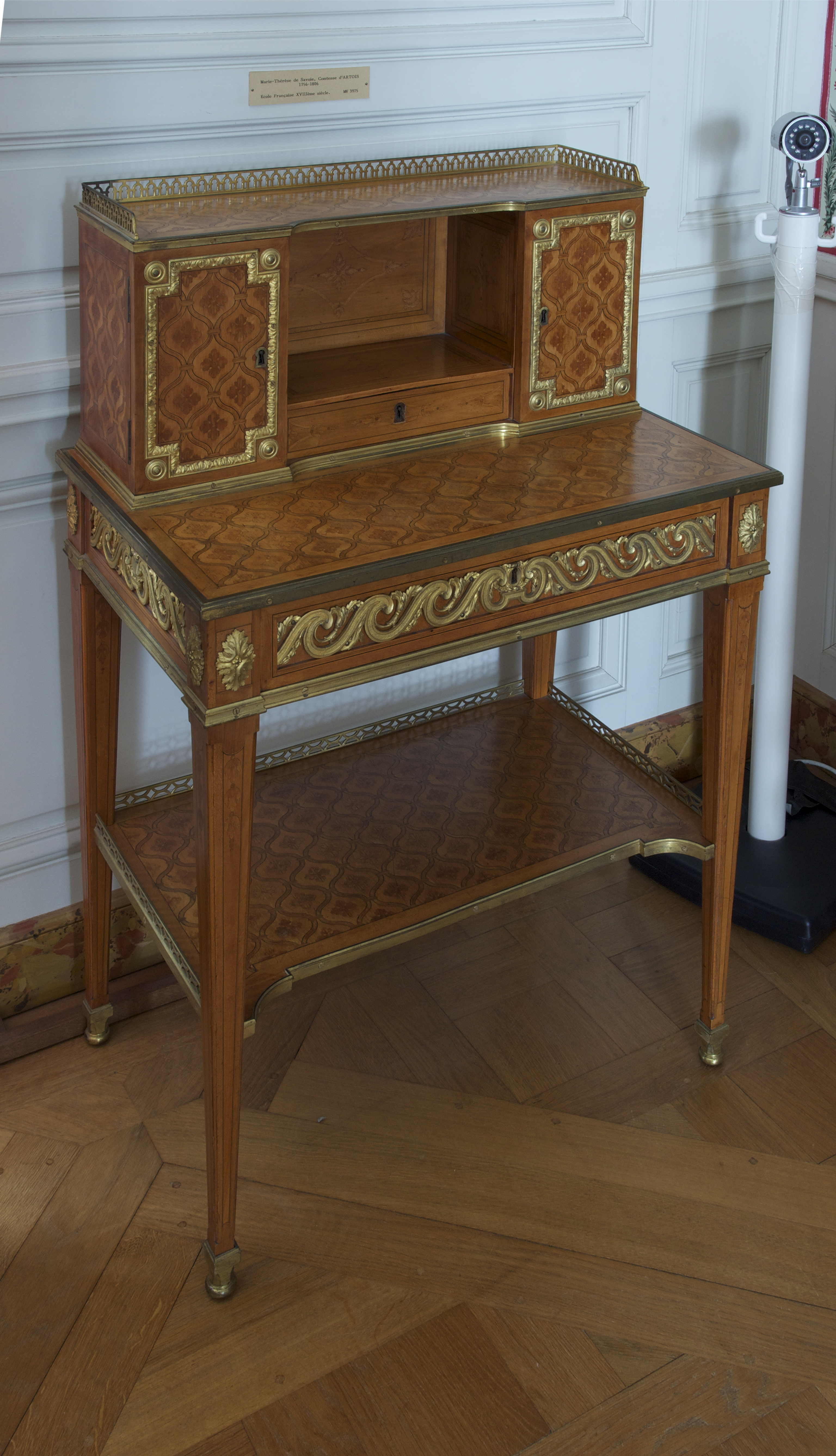 Un meuble "Bonheur du Jour", époque Louis XVI, attribué à Jean-Henri Riesener. Legs de Mme Pillaut, 1958. Petits appartement de la reine à Versailles.